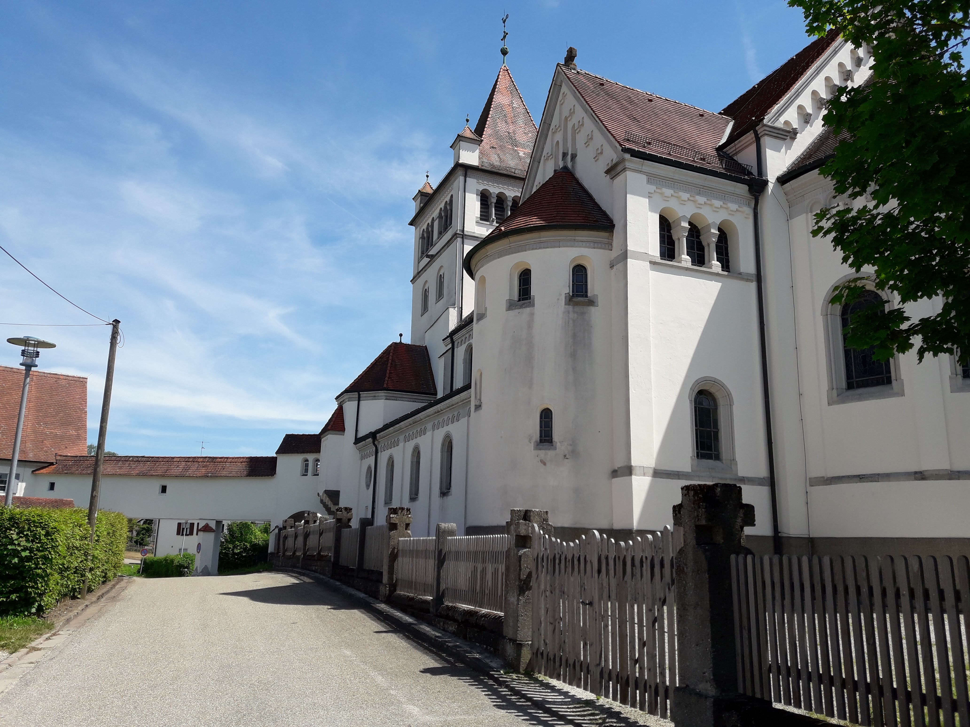 Kirche St. Gallus, Fremdingen